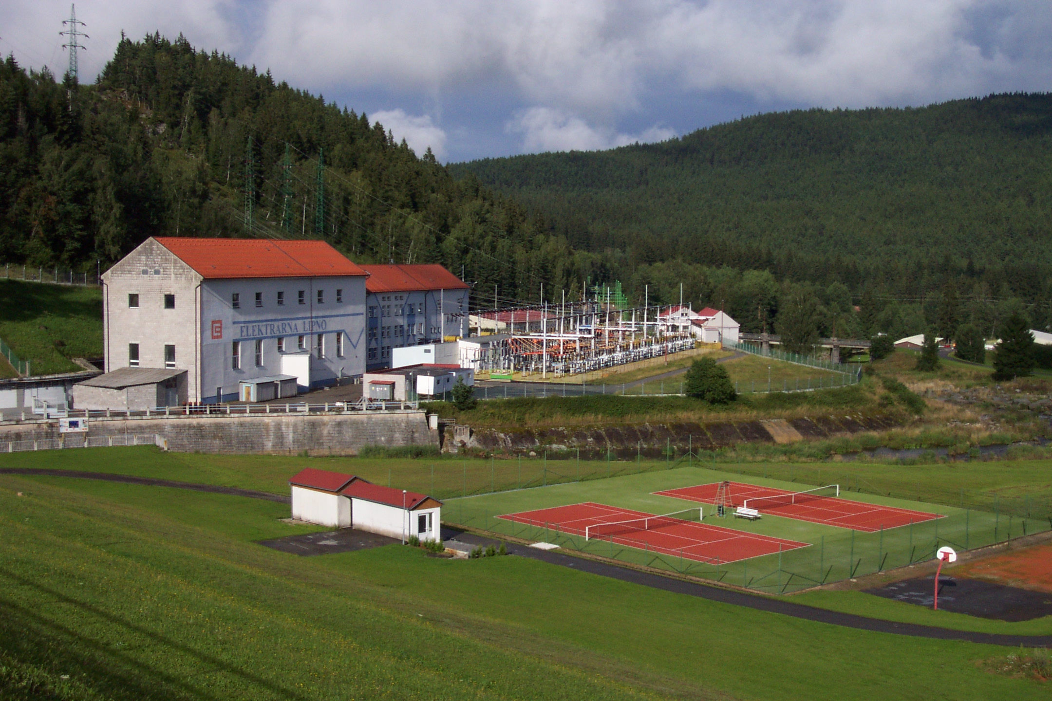 Šumava, Czech republic, The Lipno nad Vltavou dam - Šumava, Přehrada Lipno nad Vltavou